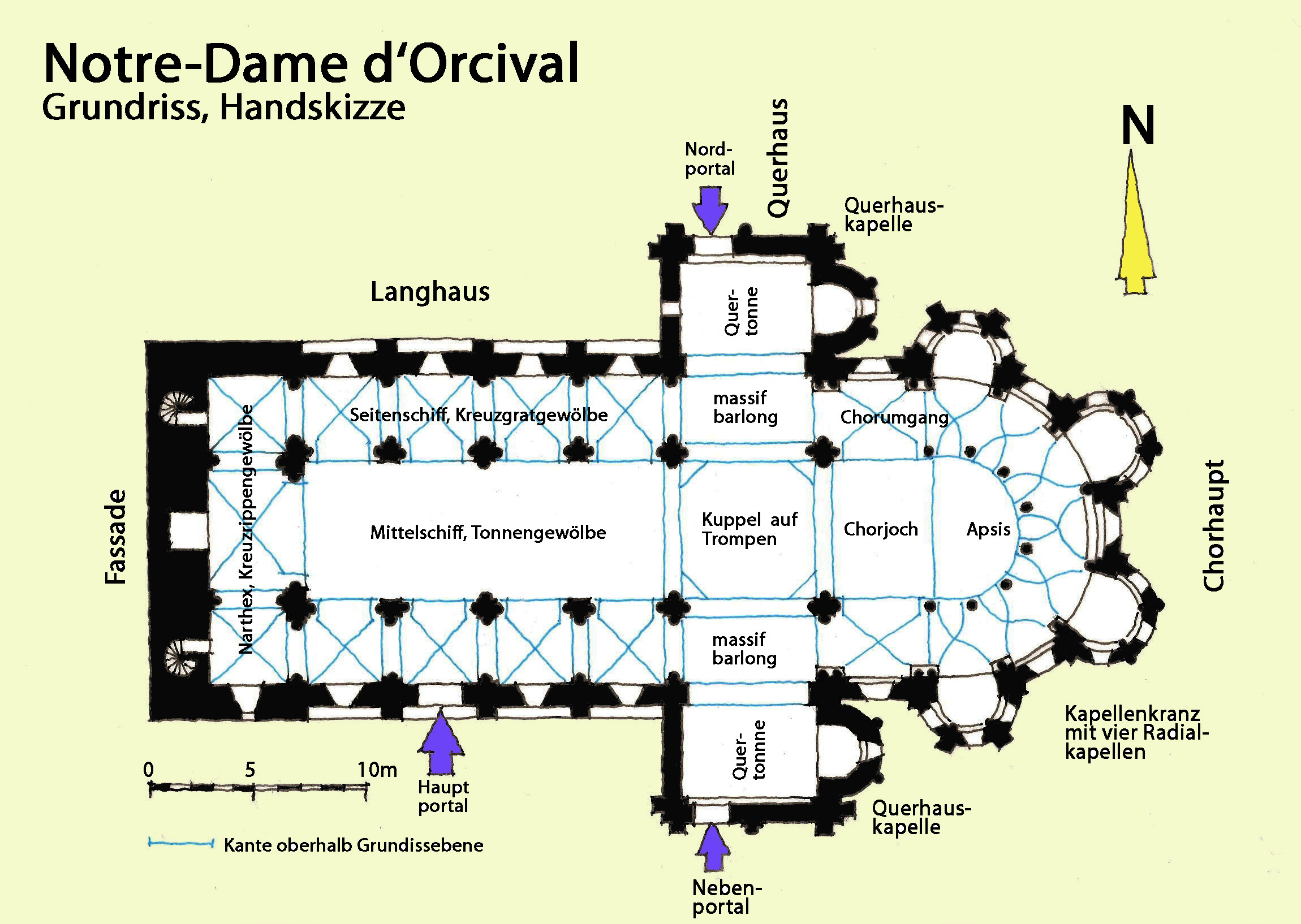 Notre-Dame d'Orcival, Grundriss, Handskizze